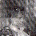 長老派婦人宣教師ケイト・ヤングマン(1880年頃、東京にて)